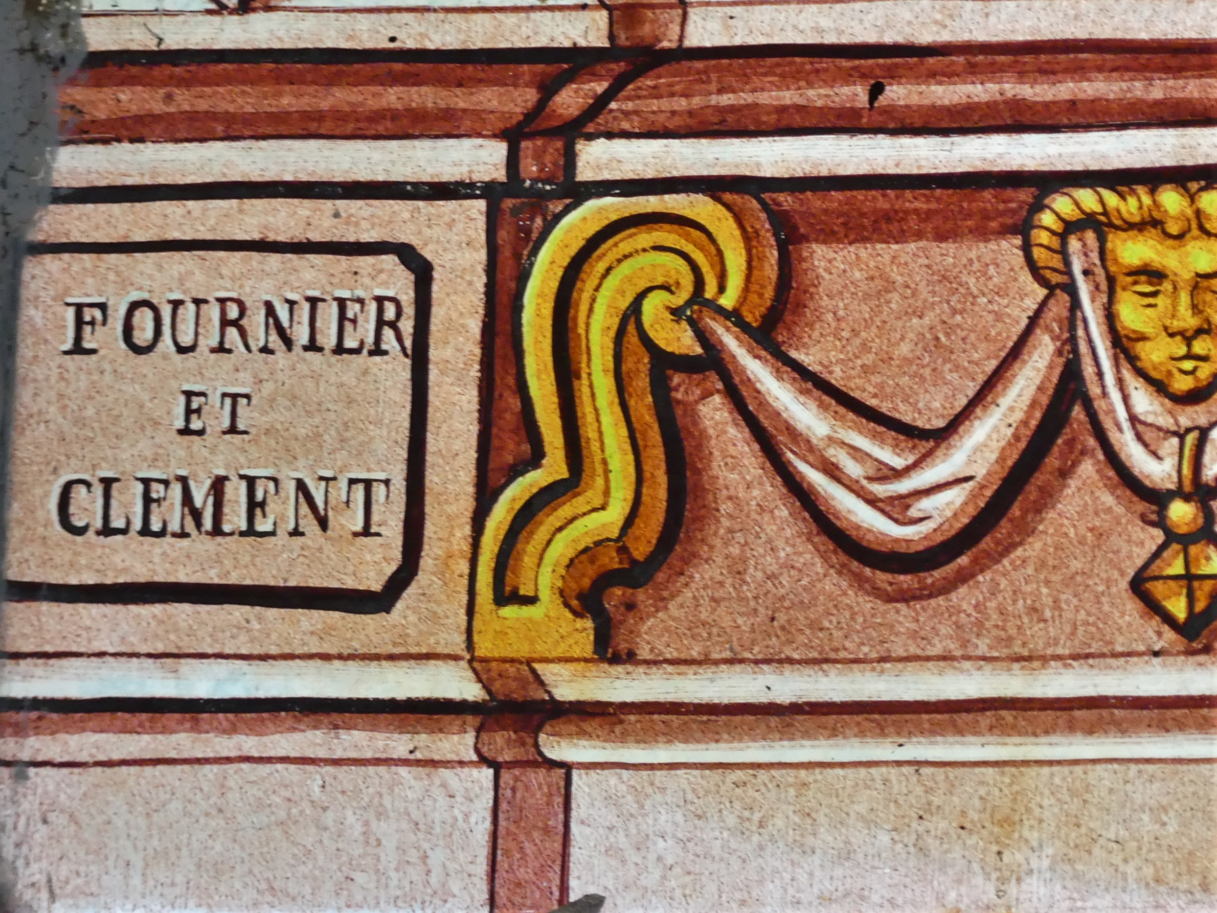 Détail d'un vitrail de la chapelle sud réalisé en 1875 par l'atelier Fournier Clément, chapelle de la Borne, Saint-Michel-de-Veisse, Creuse, France.